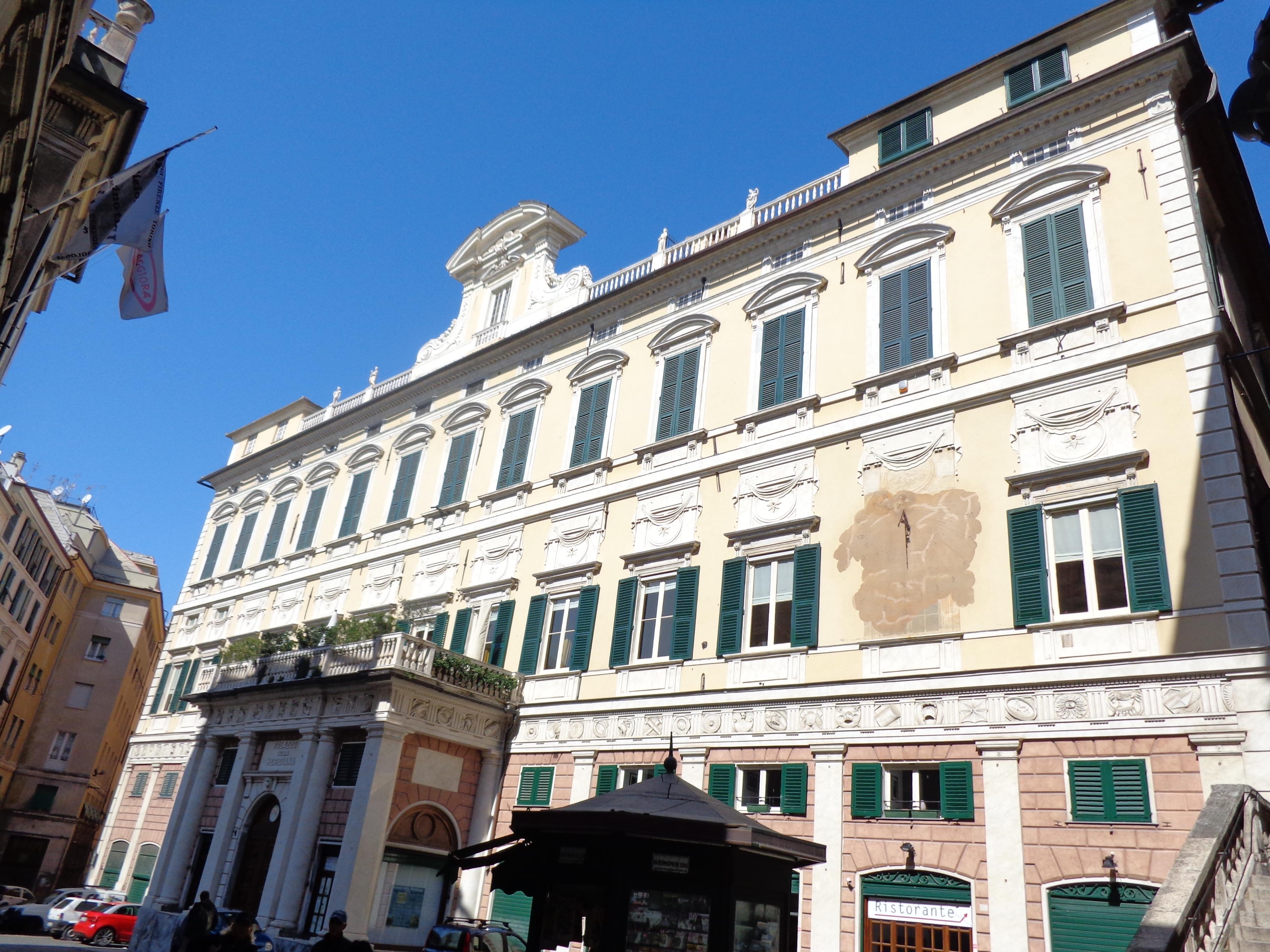 Palazzo Gerolamo Grimaldi, Genova. Facciata su piazza della Meridiana